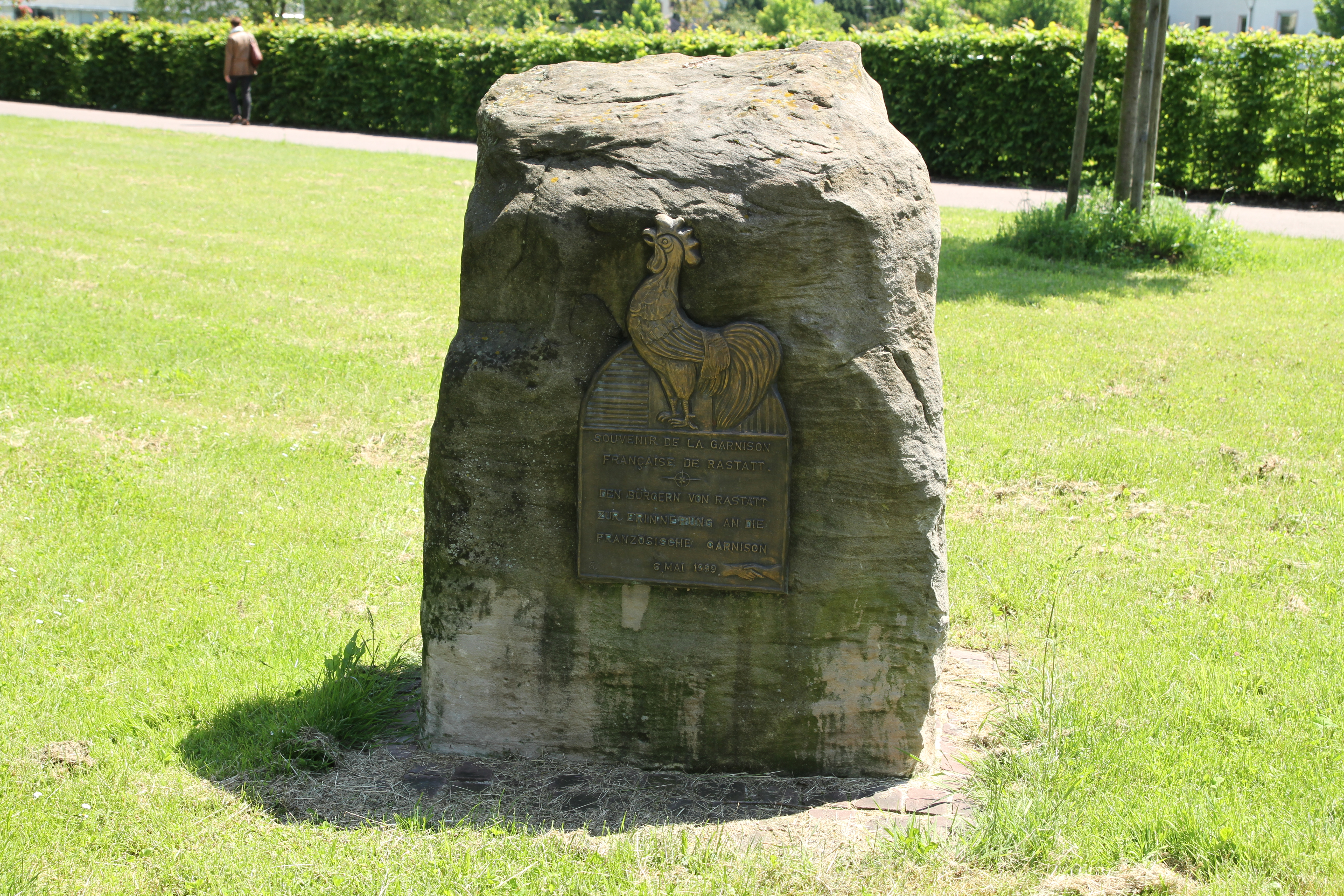 Der Gedenkstein an die französische Garnison steht an der Ludwigsfeste.